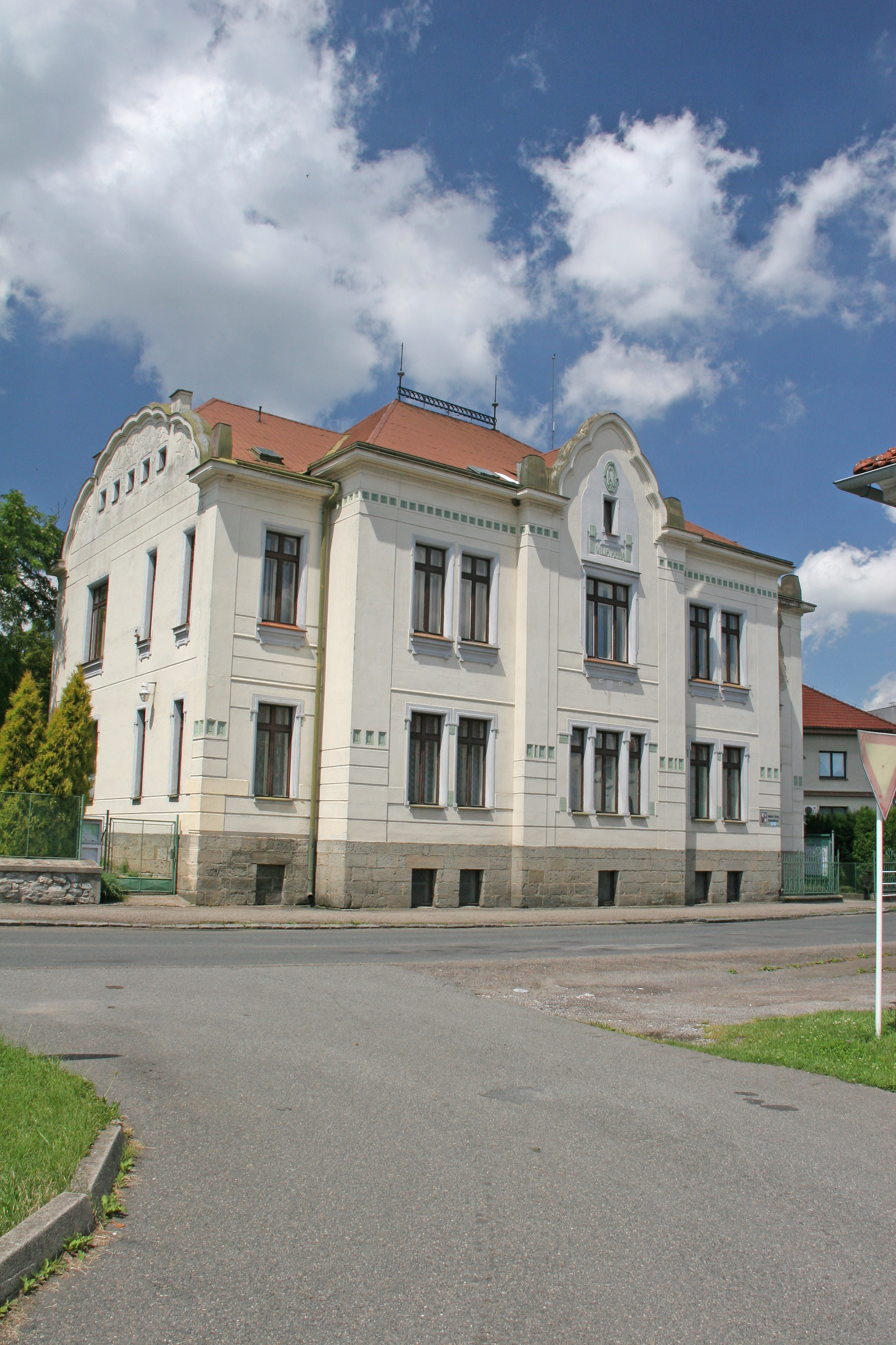 Prachovice obecní úřad